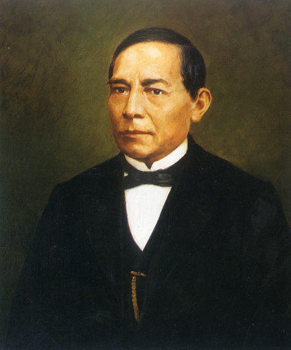 Retrato de Benito Juárez, 1861-1862. Pelegrín Clavé, óleo sobre tela, 74x60 cm, Museo Nacional de Historia. Castillo de Chapultepec. CNCA. INAH. Imagen tomada del libro: Juana Inés Abreu, María Elena Medina Segura (coord.) et al., Juárez. Memoria e imagen, México, Secretaría de Hacienda y Crédito Público, 1998, p. 216.